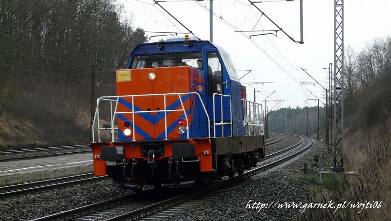 Zmodernizowany przez Pesę Bydgoszcz spalinowóz SM42-2126, jeszcze bez naniesionych oznaczeń, przejeżdża w trakcie jazdy próbnej przez osiedle Rynkowo w Bydgoszczy.